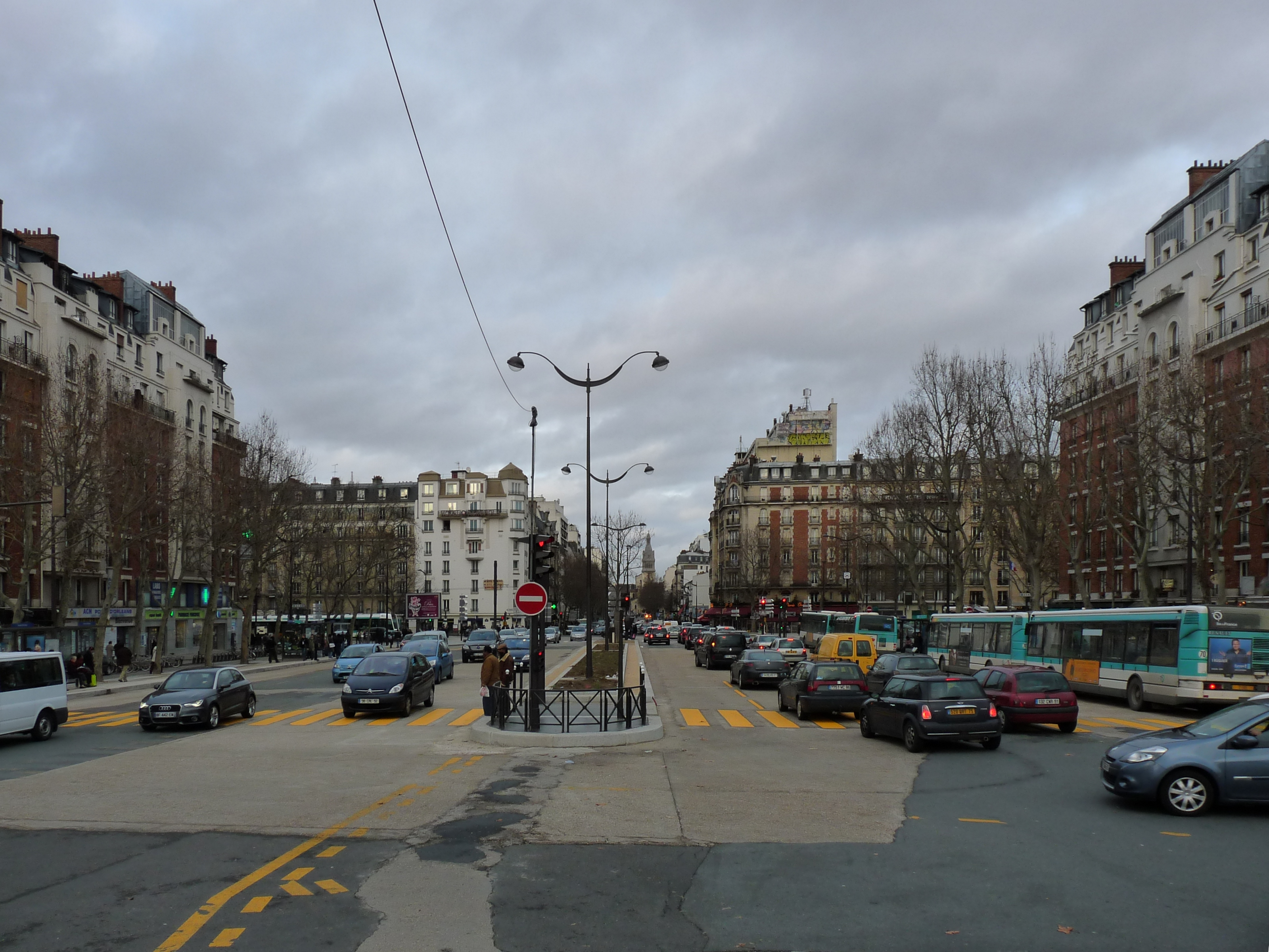 La porte d'Orléans à Paris, vue vers Paris. Au fond l'église de la place d'Alésia.